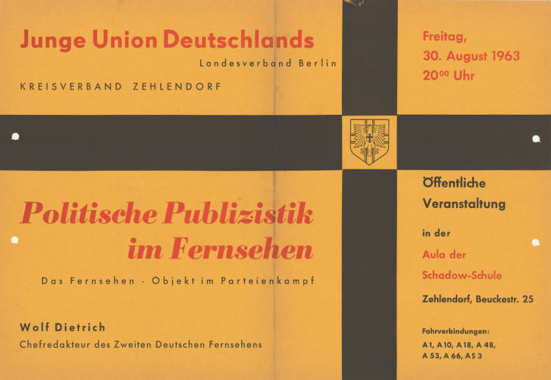 Junge Union Deutschlands Landesverband Berlin Kreisverband Zehlendorf Politische Publizistik im Fernsehen Das Fernsehen - Objekt im Parteienkampf Wolf Dietrich Chefredakteur des Zweiten Deutschen Fernsehens Öffentliche Veranstaltung ...Plakatart:AnkündigungsplakatAuftraggeber:JU LV Berlin, KV ZehlendorfObjekt-Signatur:10-028 : 396Bestand:Plakate von Jugendorganisationen der Parteien ( 10-028)GliederungBestand10-18:Plakate von Jugendorganisationen der Parteien (10-028) » CDU » Veranstaltungsplakate A - ZLizenz:KAS/ACDP 10-028 : 396 CC-BY-SA 3.0 DE